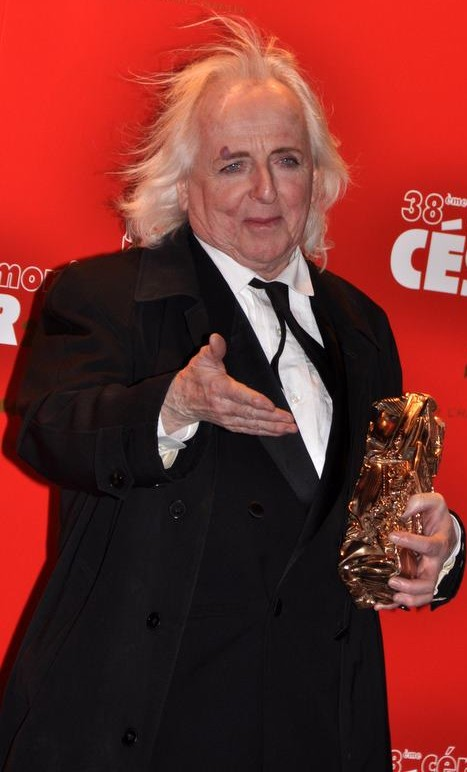 Christian Gasc, chef costumier, à la cérémonie des César